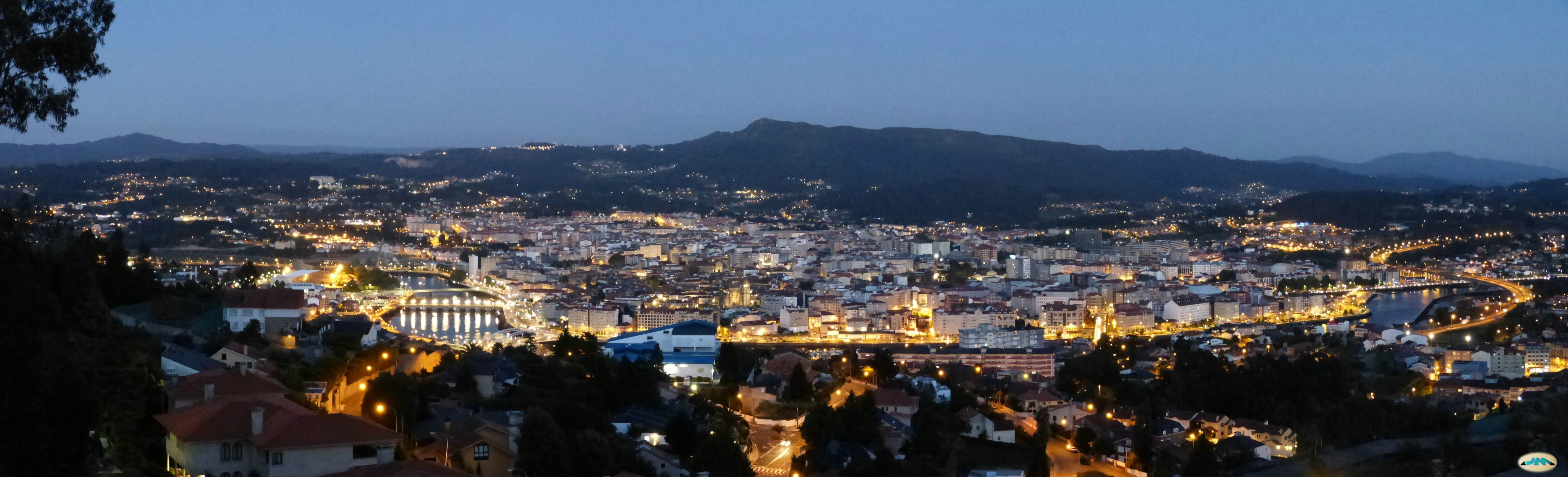 Pontevedra-Panorama de noche